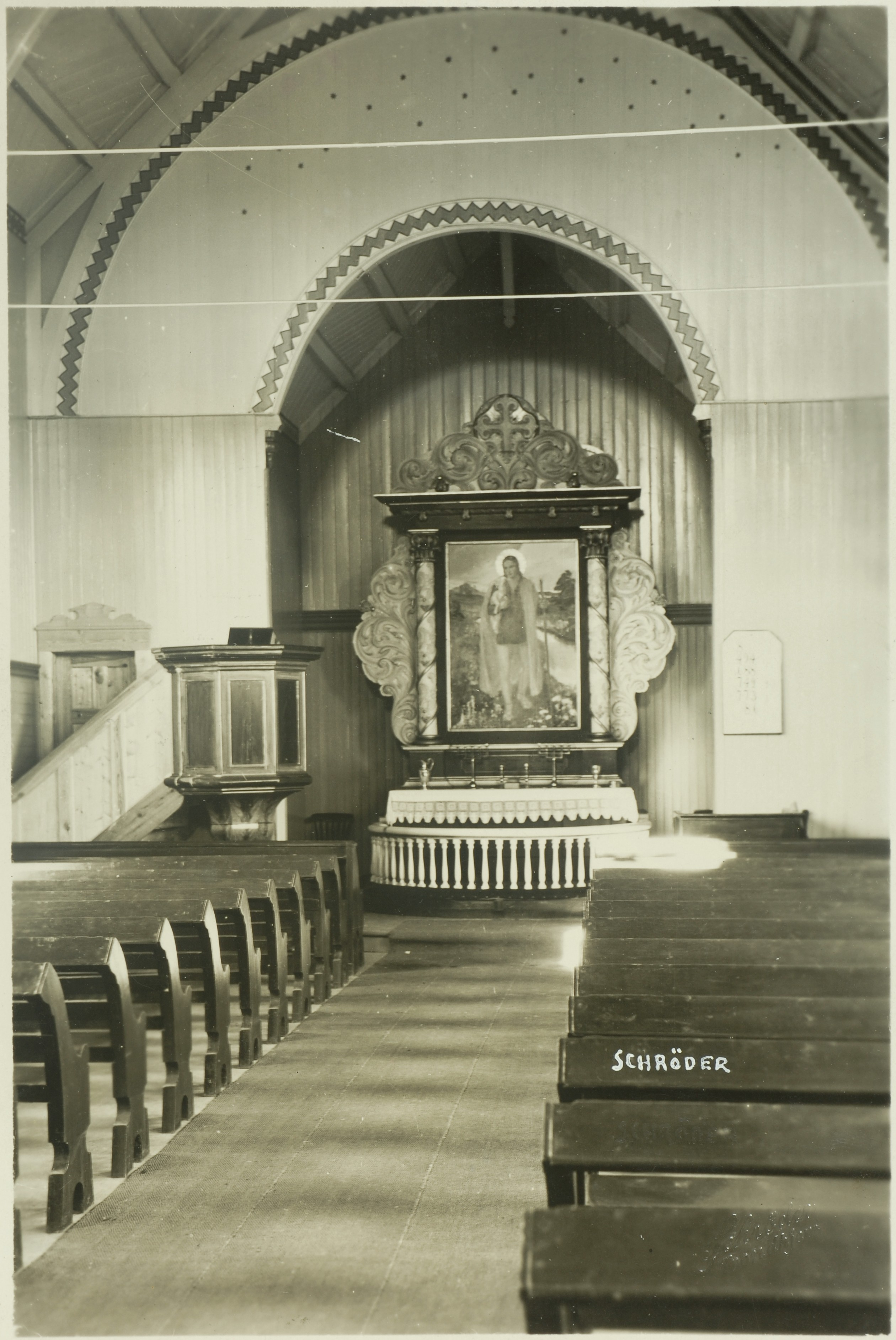 Berkåk church in Rennebu, Norway